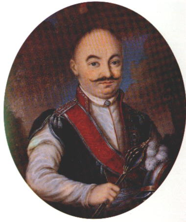 Józef Gabriel Stempkowski died 1793